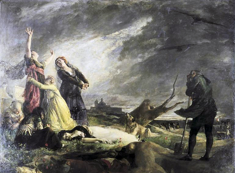 La obra representa a un grupo de personas lamentándose, tras el estallido de la Guerra de la Independencia Española, ante los cadáveres de los fusilados por los franceses en la ciudad de Madrid a principios de mayo de 1808.